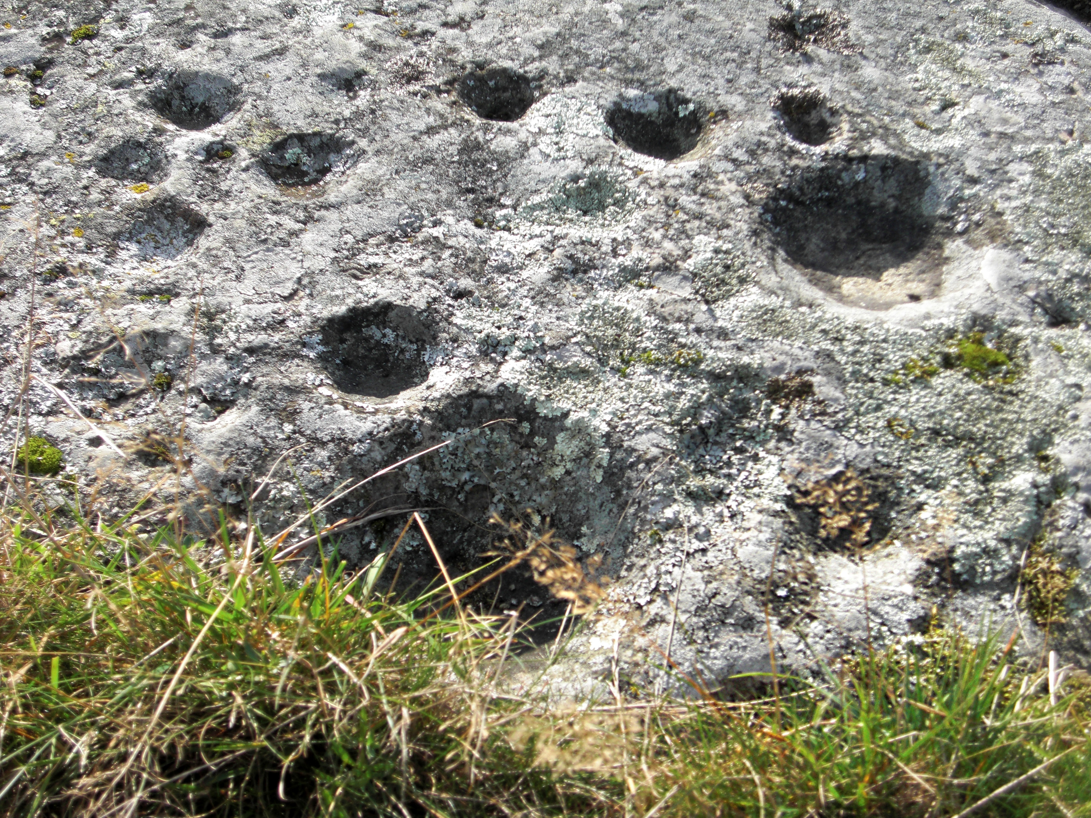 Närbild av de stora skålgroparna på takblocket till en gånggrift på gravfältet Ekornavallen (Raä-nr Hornborga 29:1) i Hornborga socken, Gudhems härad, Falköpings kommun, f.d. Skaraborgs län, Västergötland, Sverige.